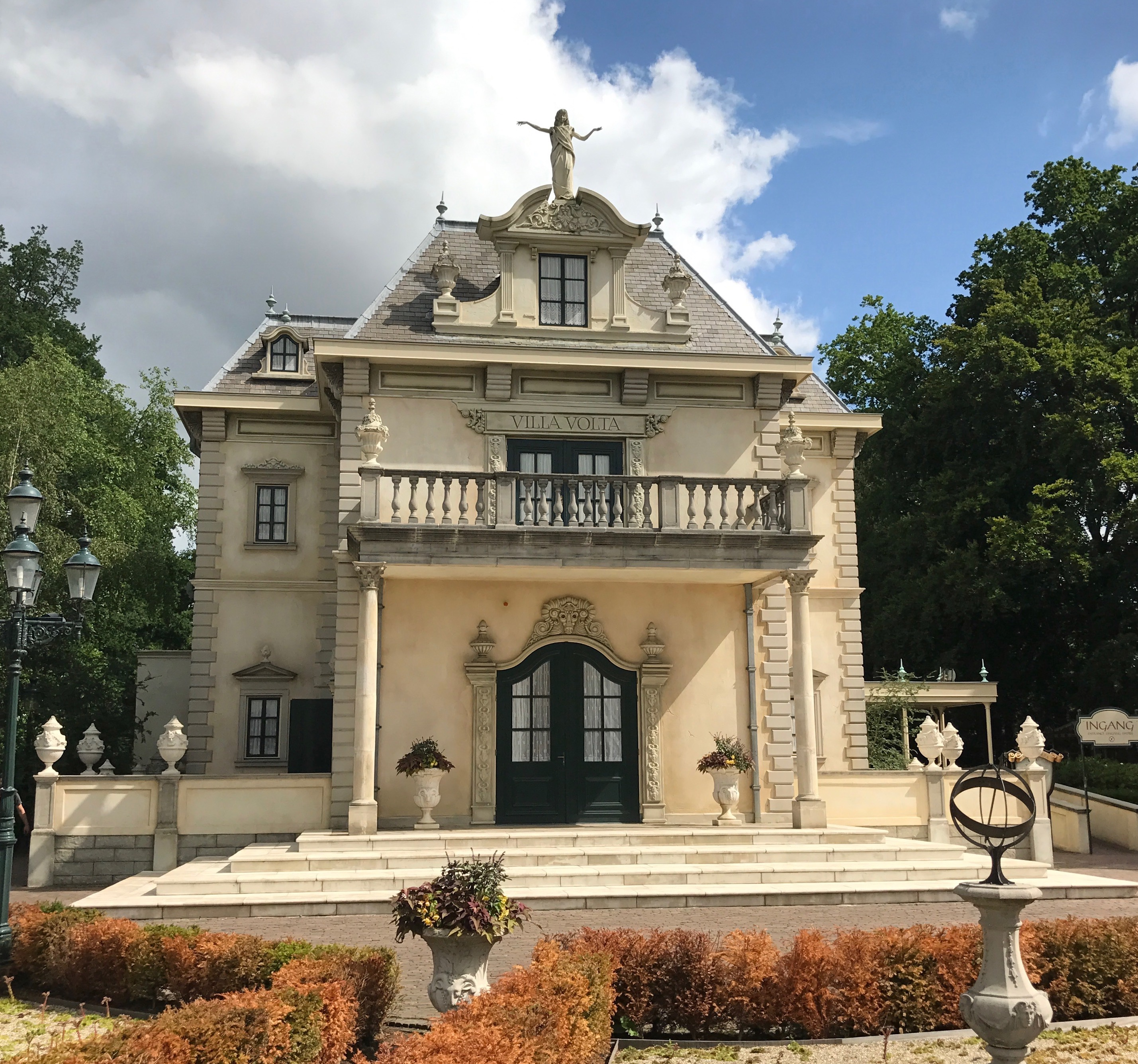 Villa Volta in het Nederlandse attractiepark De Efteling 2016